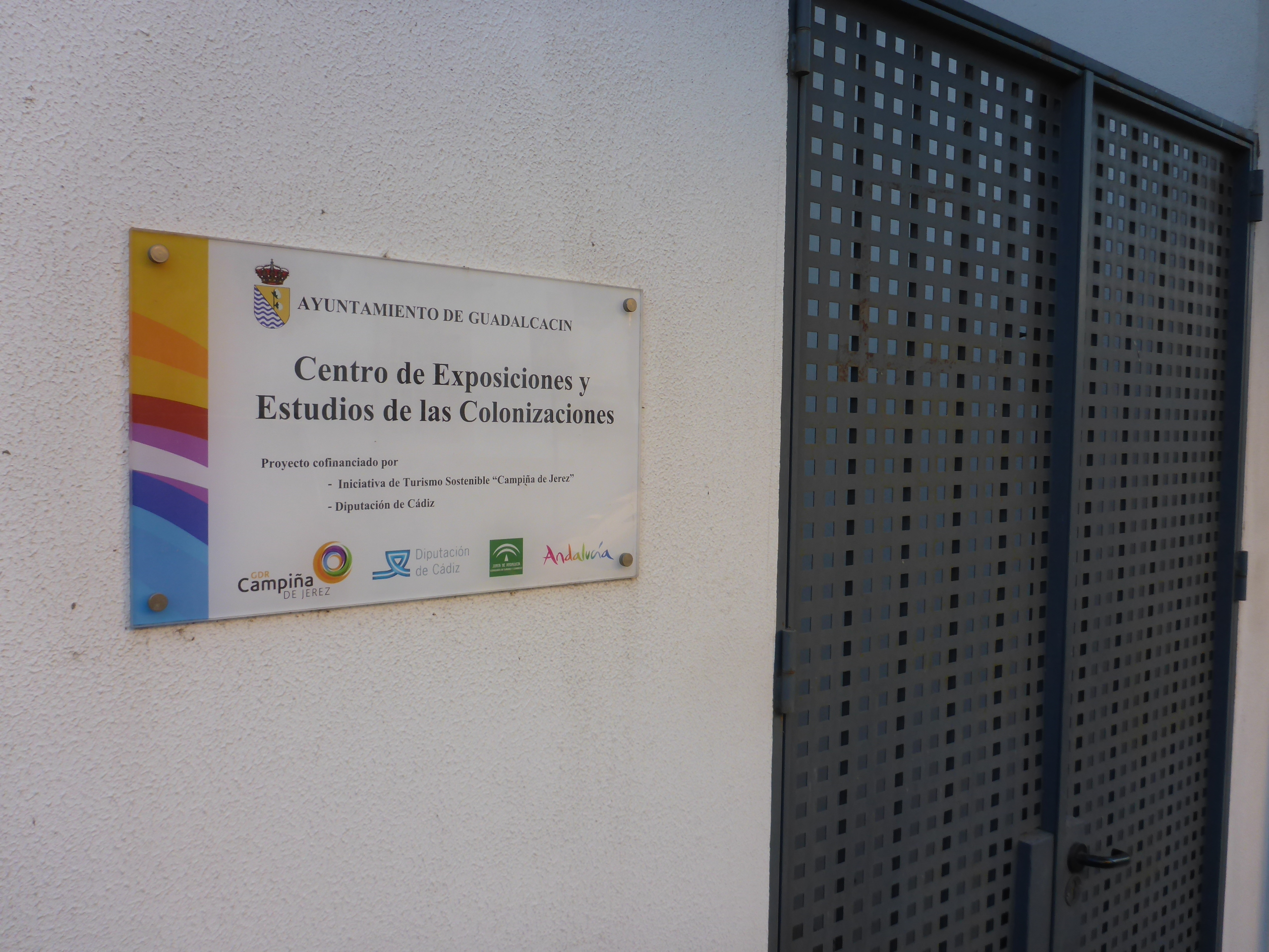 Guadalcacín, Jerez (Andalucia, España)